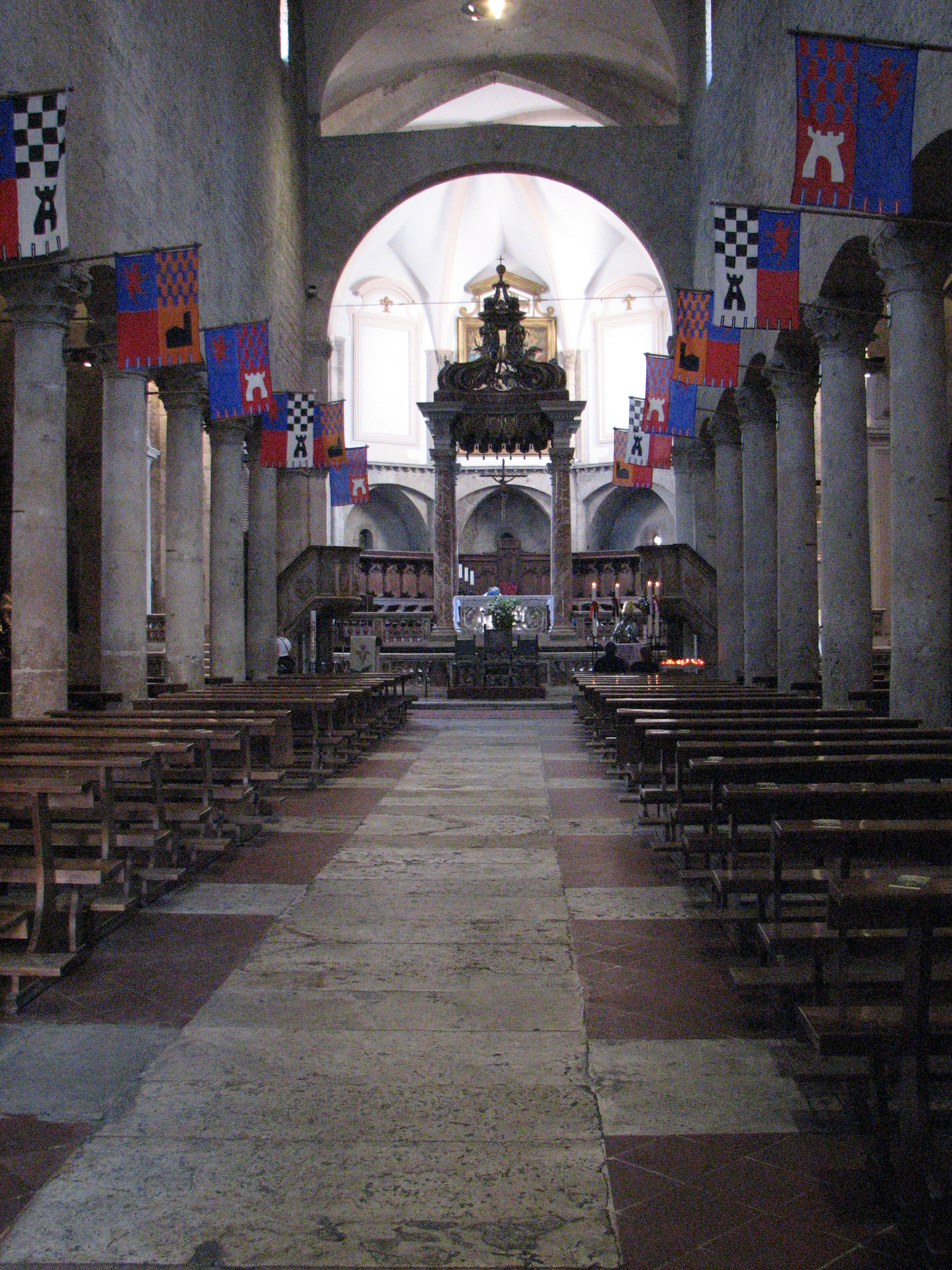 Narni Cattedrale San Giovenale